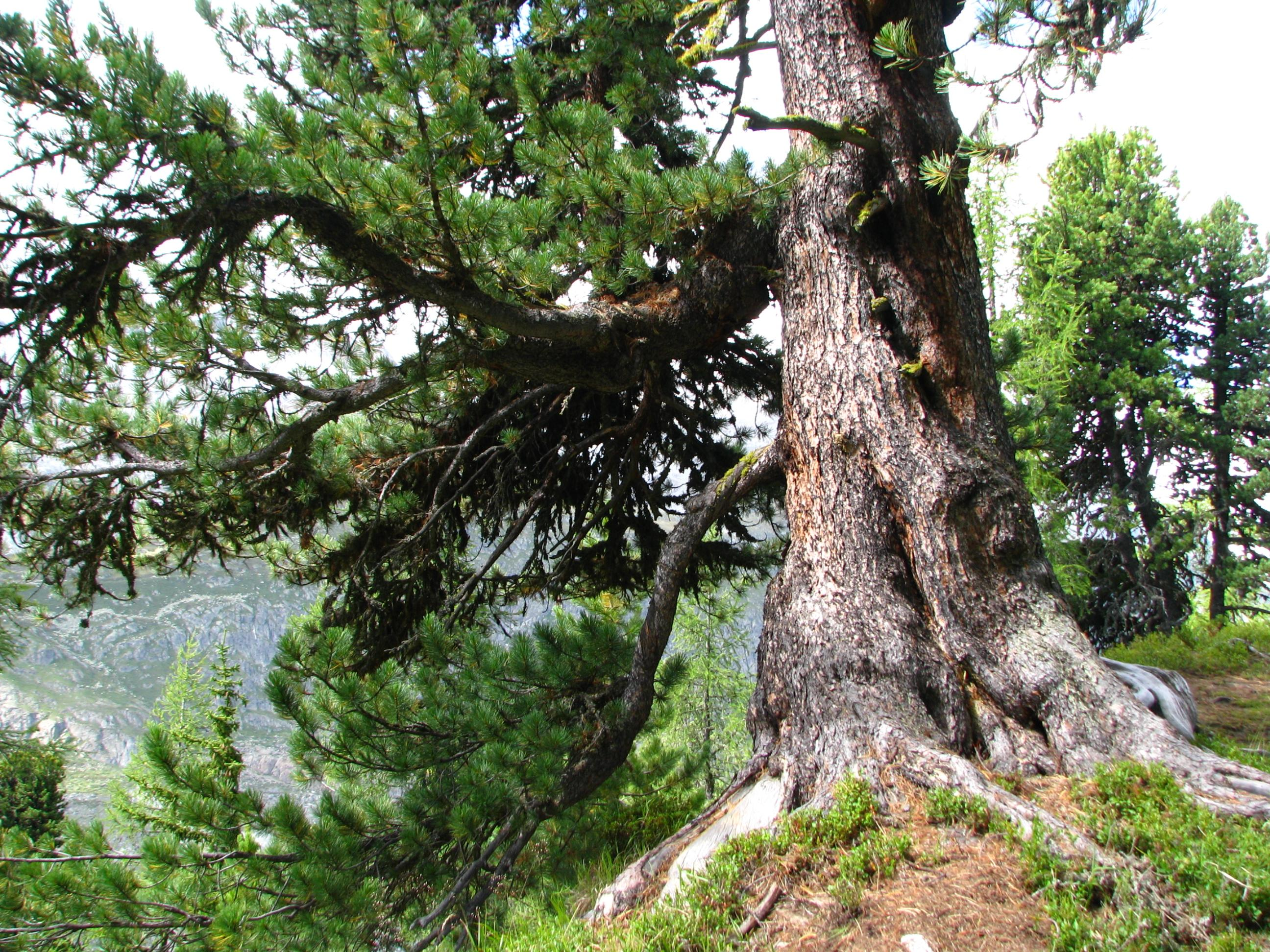 Alte Arve Pinus cembra im Aletschwald bei Brig (Schweiz, Kanton Wallis).